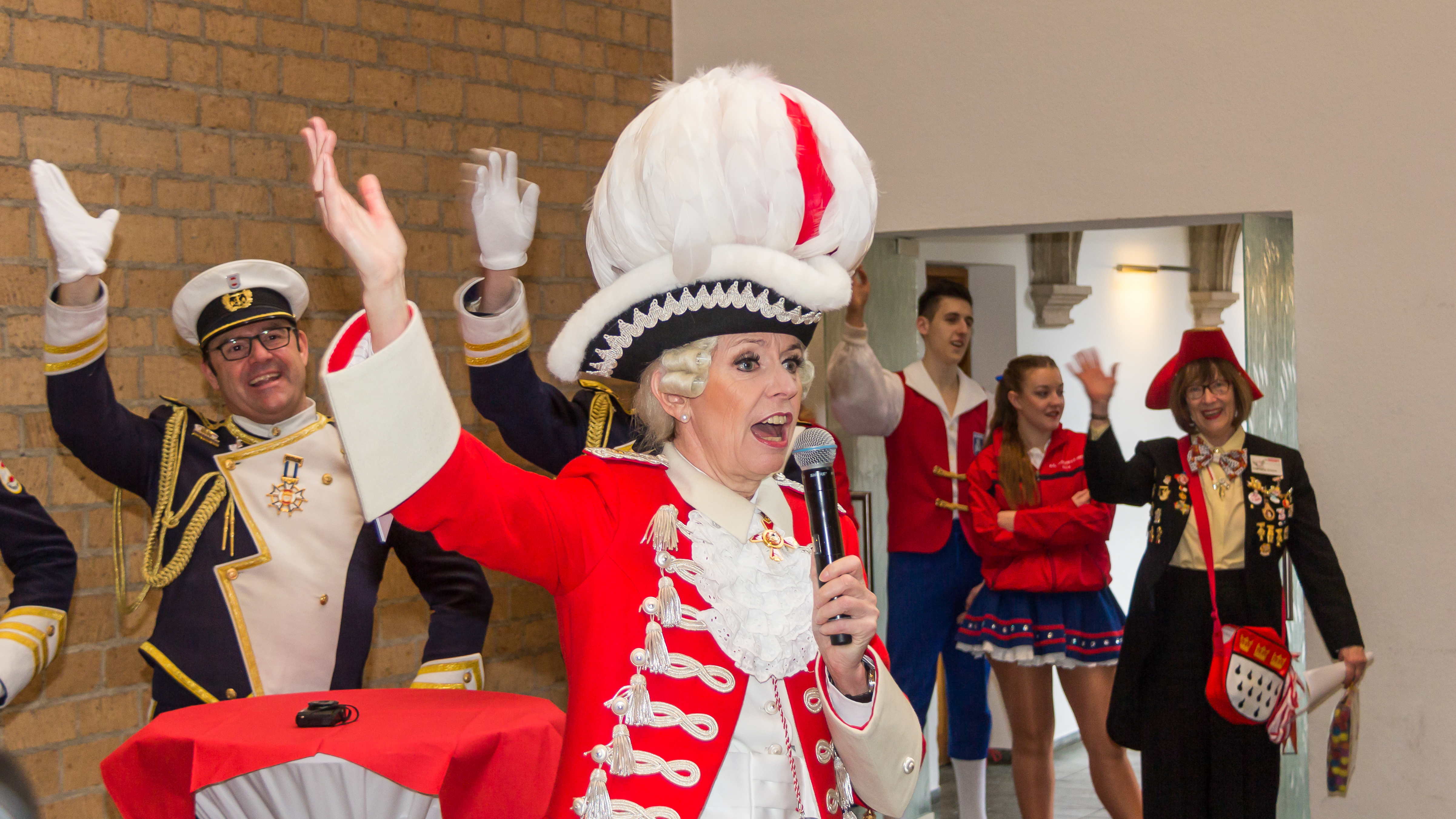 Rosenmontagsempfang der Oberbürgermeisterin in der Piazzetta des Historischen Rathauses von Köln, 2016 Foto: Oberbürgermeisterin Henriette Reker, in der Uniform der Roten Funken (Funken-Spitzname: „Agrippina Courage“), ist die erste Frau als aktives Mitglied in der Karnevalsgesellschaft (qua Amt).